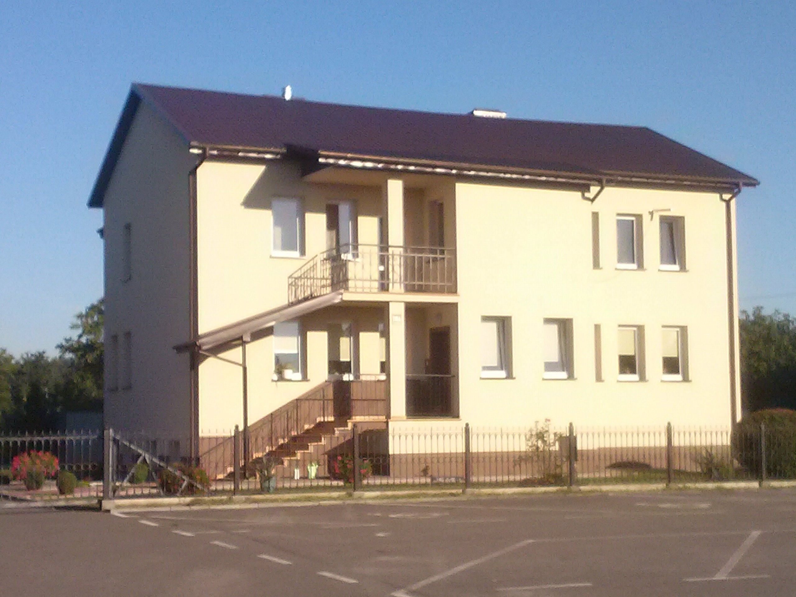 Dom zakonny sióstr Felicjanek w Wólce Pełkińskiej